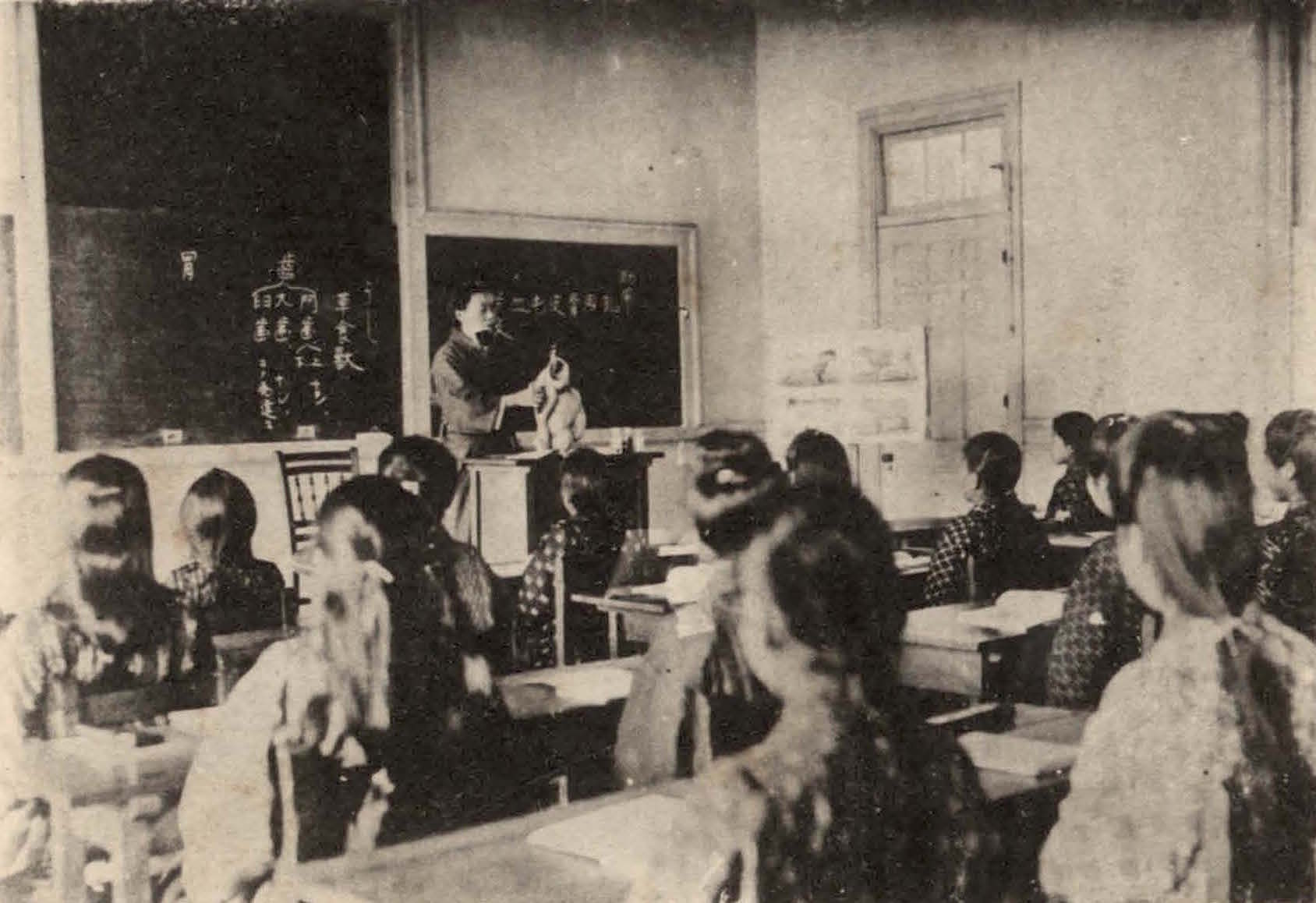 Bân-lâm-gú: 理科 (出處之解說)